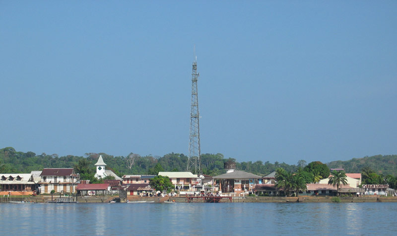 Saint Georges de l'Oyapock Guyane Française